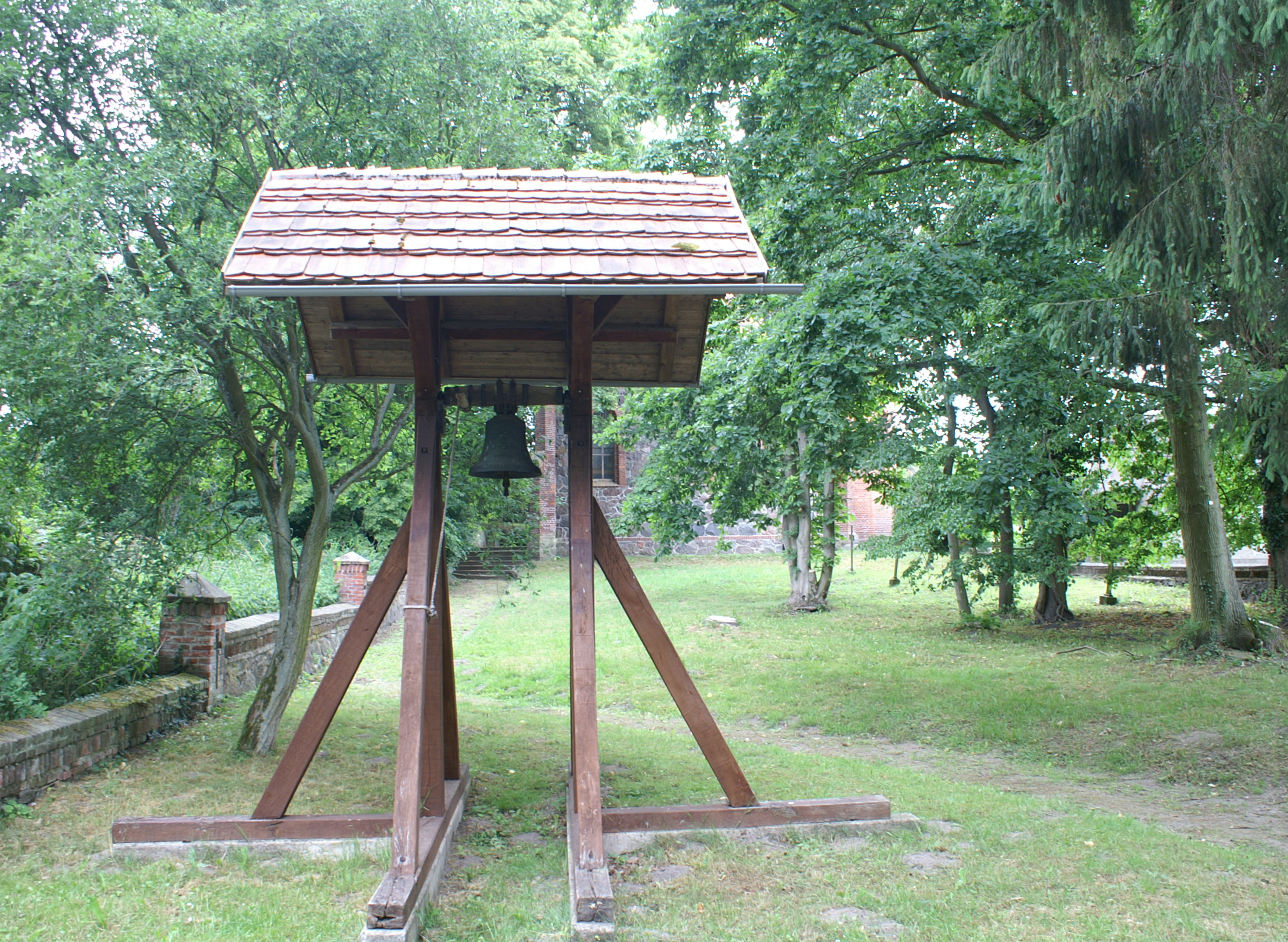 Kirche in Roidin, Glockenstuhl